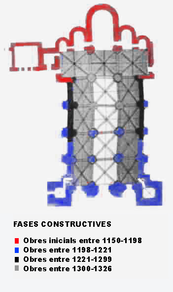 Primer plano de la catedral de Sigüenza